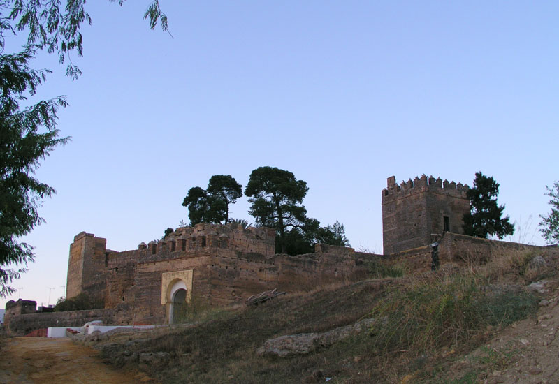 Castillo de Luna, provincia de Sevilla (España) Fotografía propiedad de quien la coloca en Wikipedia (yo mismo). Se ceden los derechos de autor a Wikipedia.